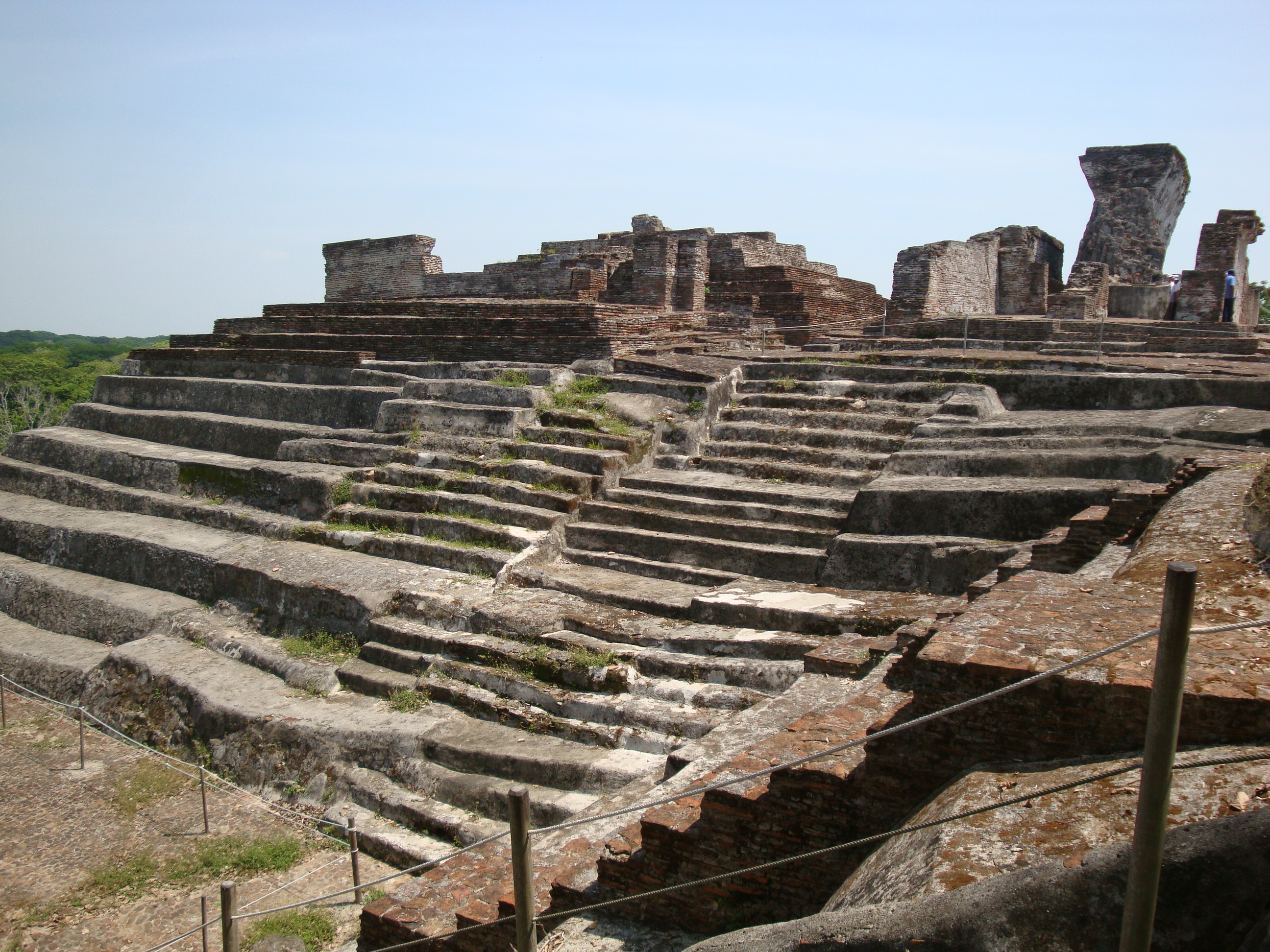 Estructura 5, perteneciente a la Plaza Suroeste, en la ciudad maya de Comalcalco, Tabasco, México.